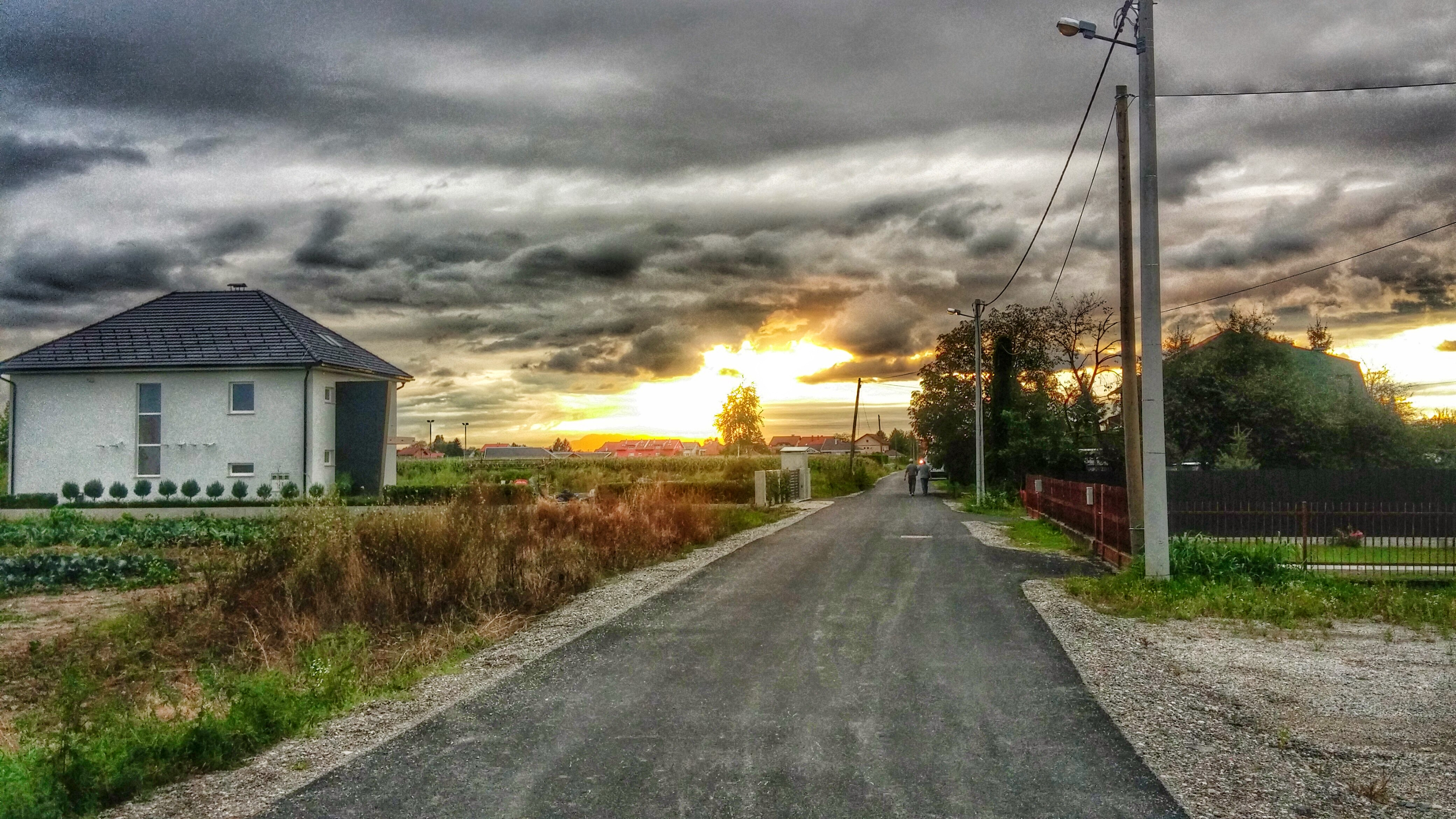 2. rujna 2014.